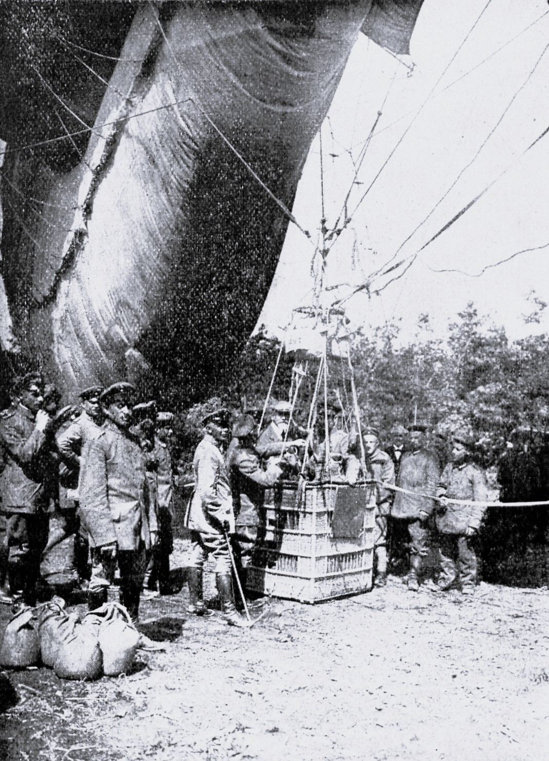 Herr Bürgermeister Dr. Fehling, im Begriff mit dem größten Fesselballon nahe der Argonnenfront, der aus 850 m Höhe einen Blick auf die Schützengräben und von Verdun bis gegen Reims gestattete, aufzusteigen